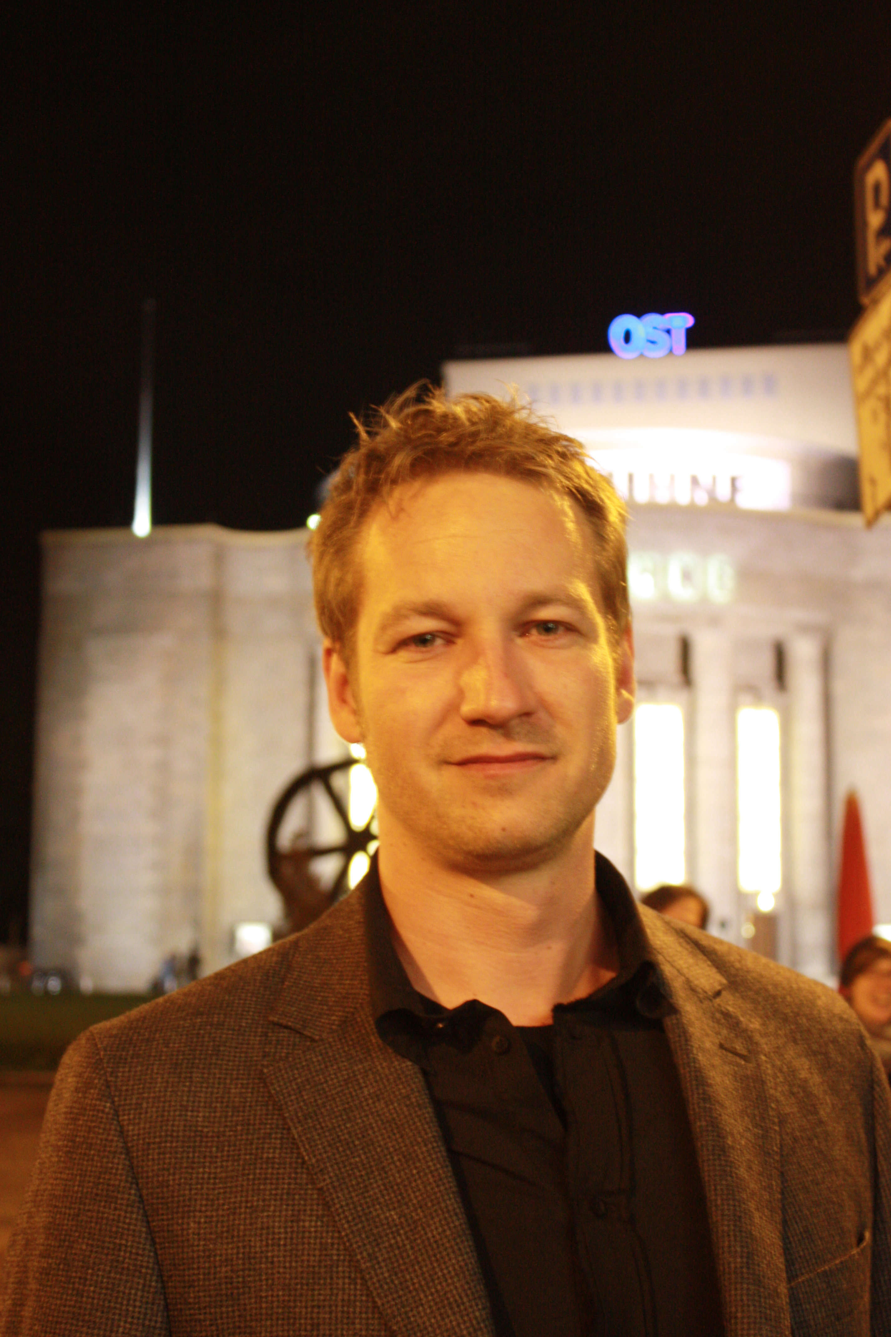 Tobias Kluckert nach der Ohrkanus-Verleihung 2010 im Babylon Kino in Berlin